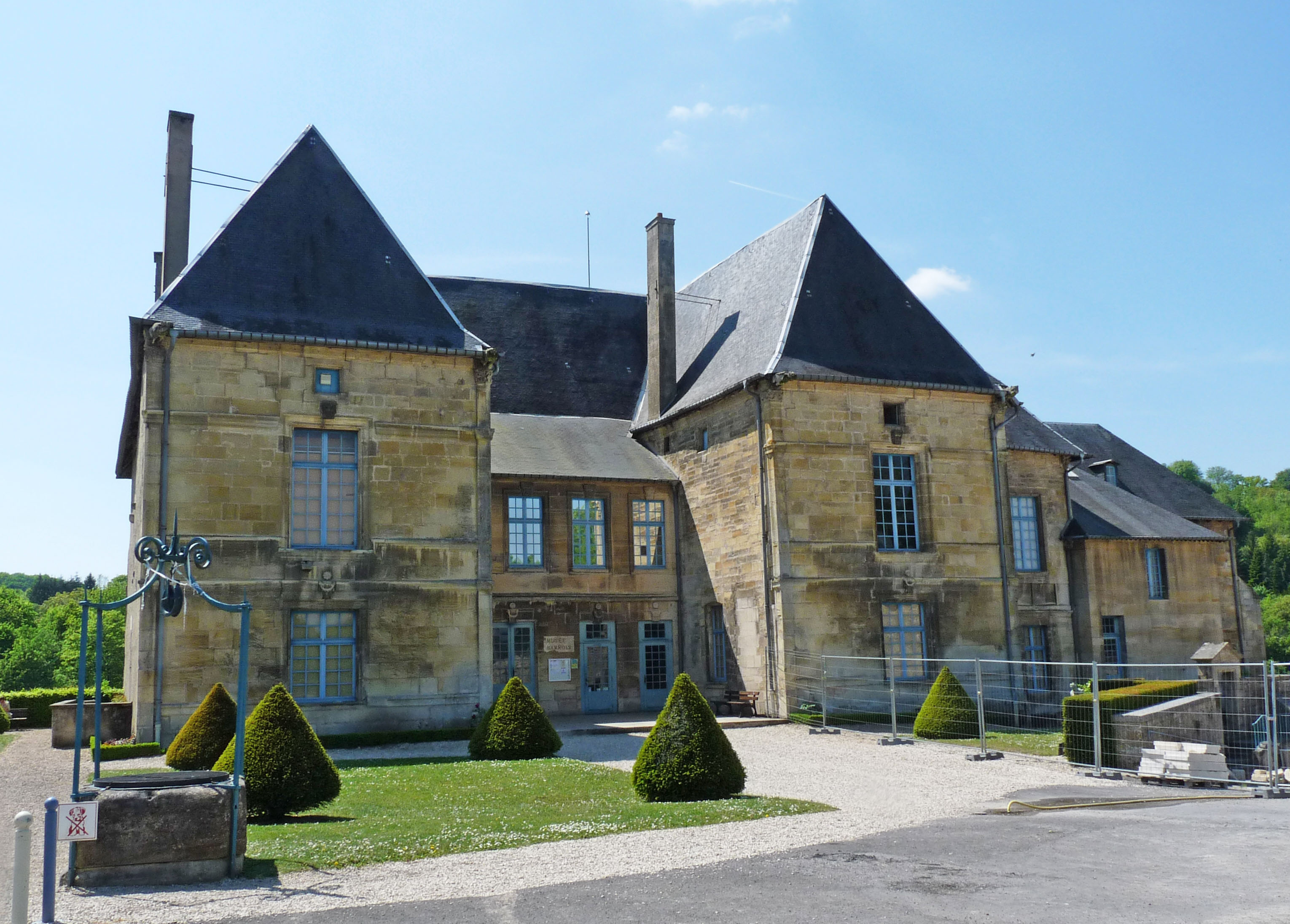 Château des ducs de Bar abritant le Musée Barrois à Bar-le-Duc (Meuse), 6, rue François-de-Guise. Inscrit aux Monuments historiques en 1981. En travaux en 2011.